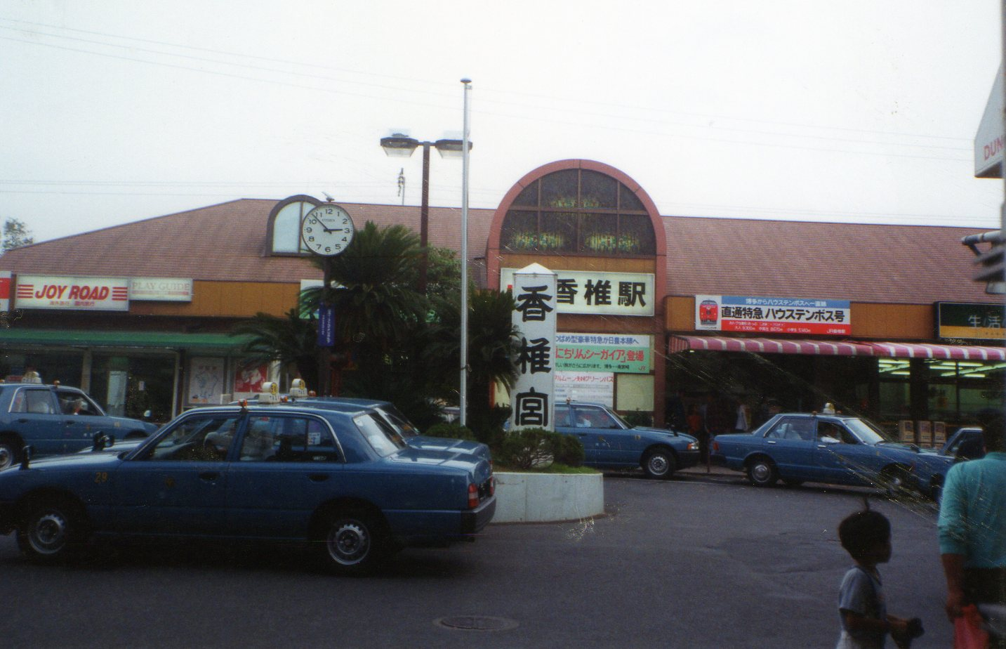 1993年の香椎駅舎